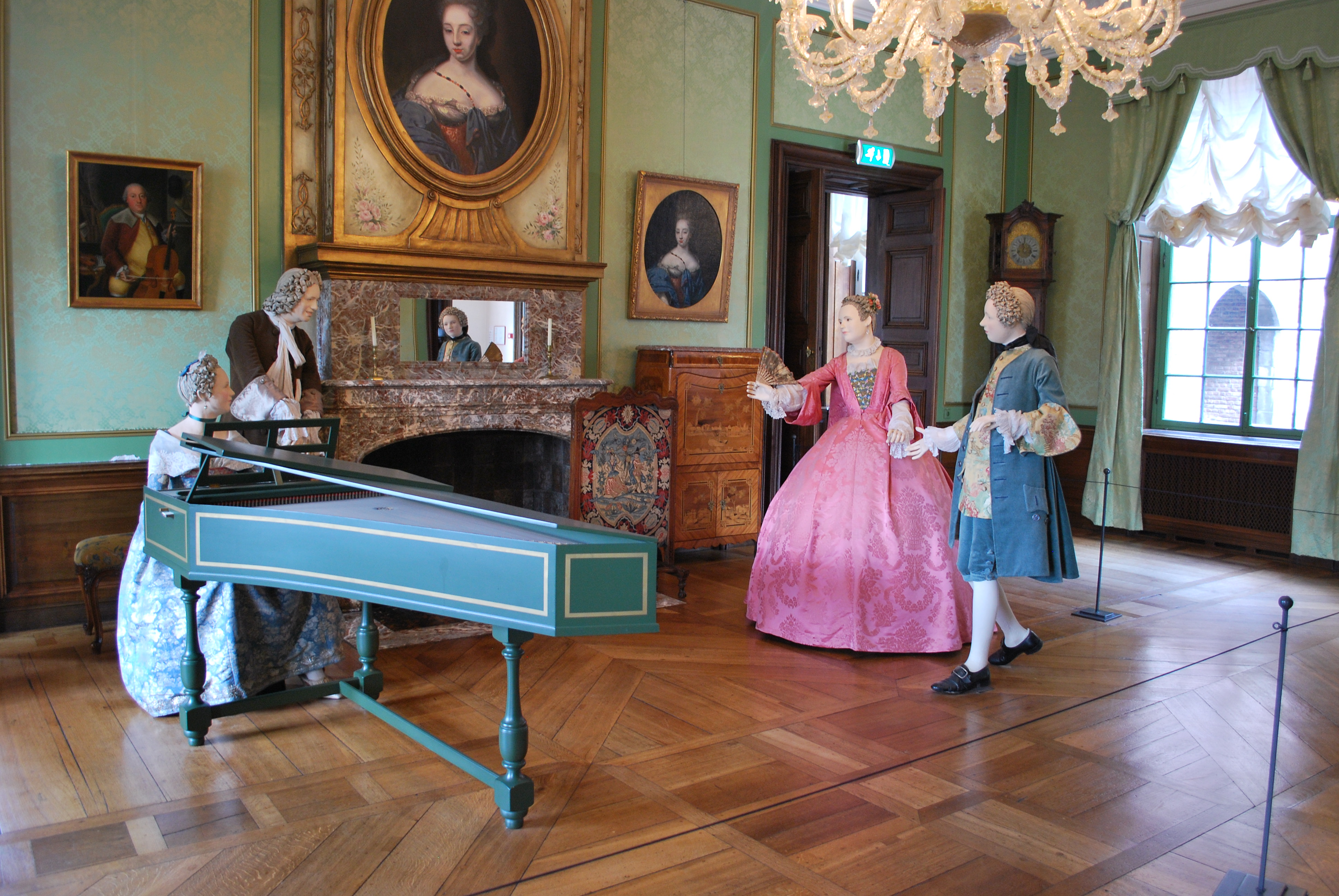 Schloss Hoensbroek, Ballsaal im Erdgeschoss des Nordwestflügels des Herrenhauses